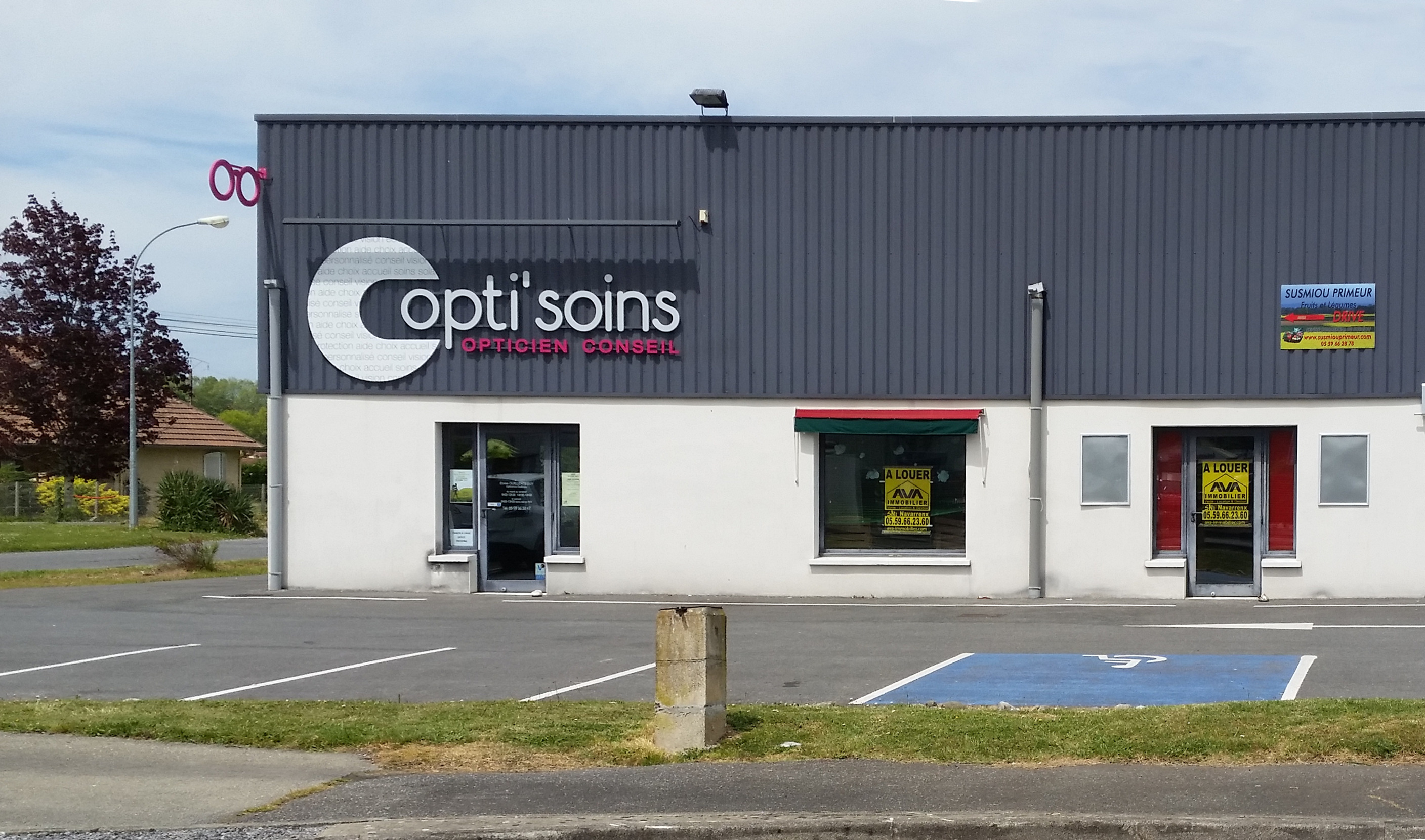 Enseigne avec jeu de mot : Opti[que] soins = Aux p[e]tits soins (expression)